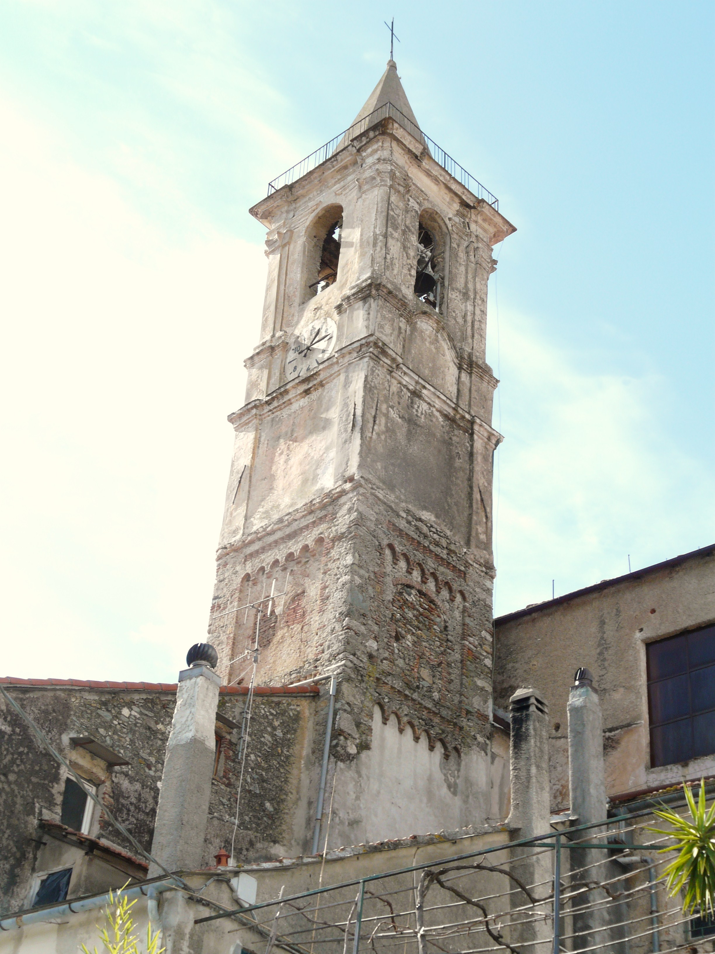 Il campanile della chiesa di San Lorenzo di Feglino, Orco Feglino, Liguria, Italia